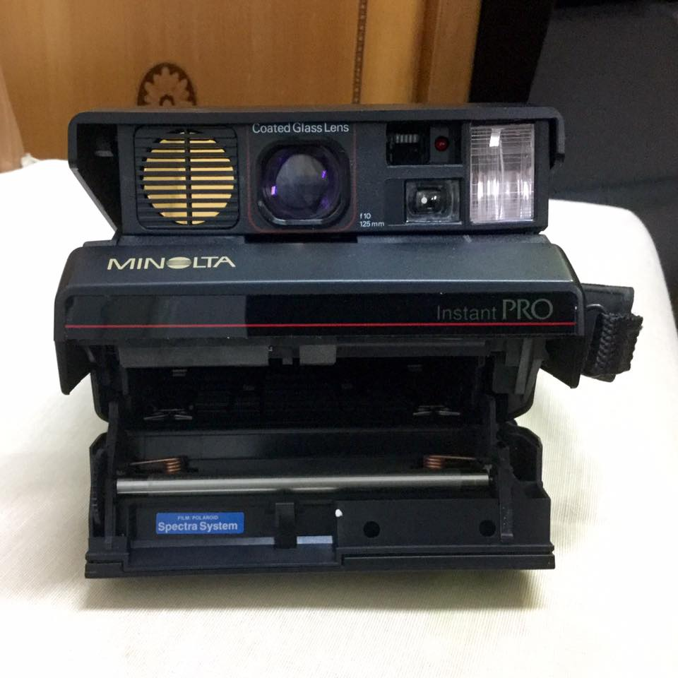 美樂達1990年所推出的Spectra Pro (Instant Pro)